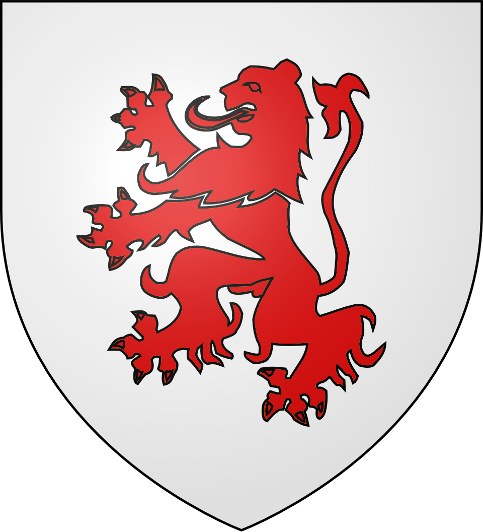 Blason du comté d'Armagnac : d'argent au lion de gueules